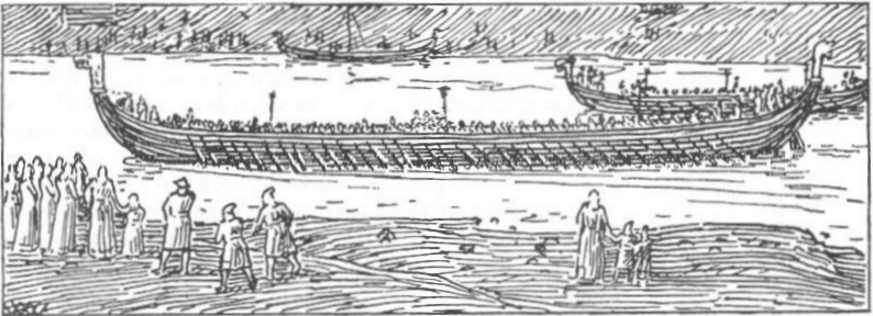 Illustration for Harald Hardrådes saga, Heimskringla 1899-edition. nn: «Kvinner frå Nidaros står og ser på at skipet vert drive fram med sytti årer.»